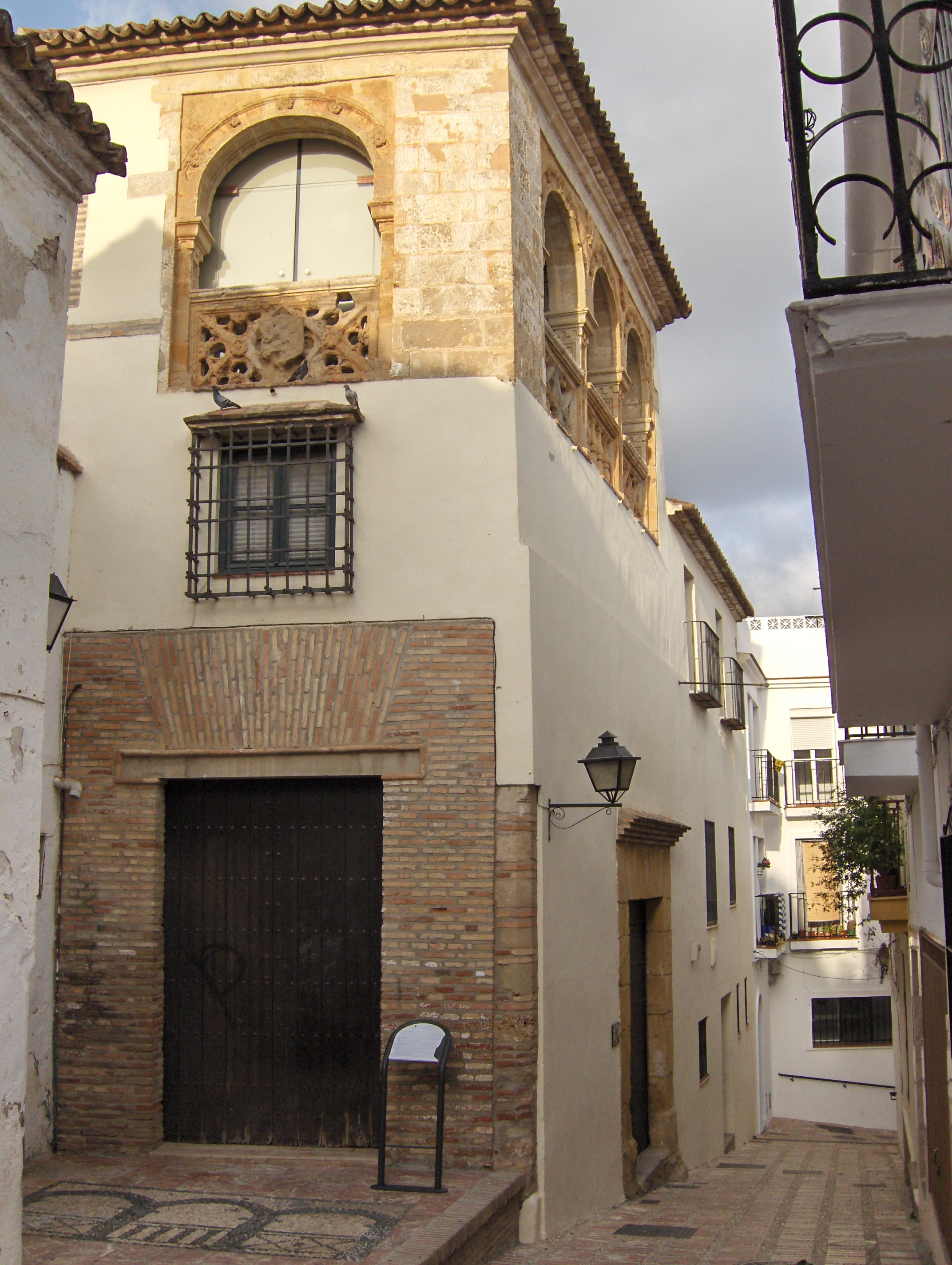 Hospital Bazán, sede del Museo del Grabado Español Contemporáneo, Marbella, España.